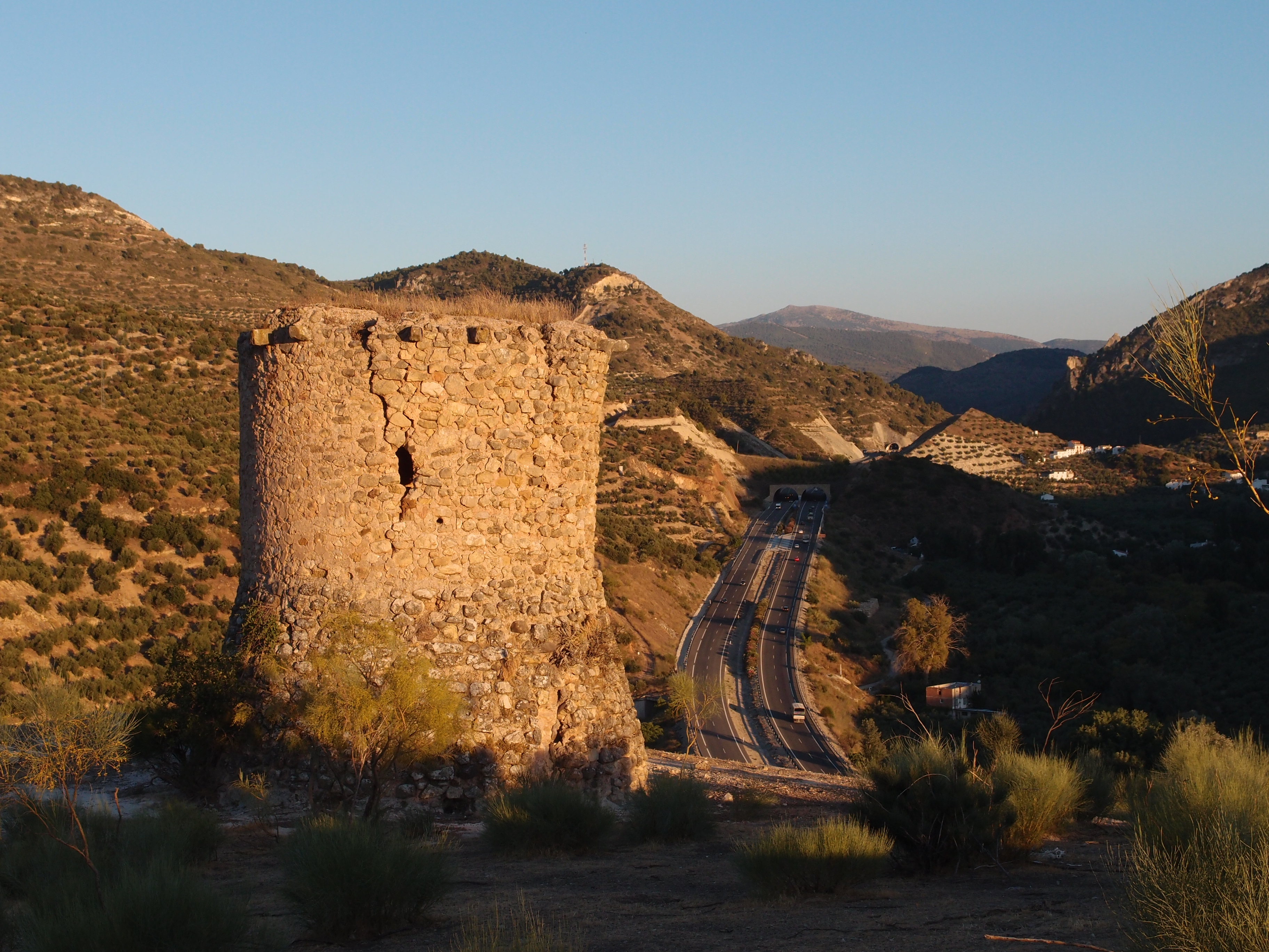 Torre de la Cabeza junto a La Cerradura.